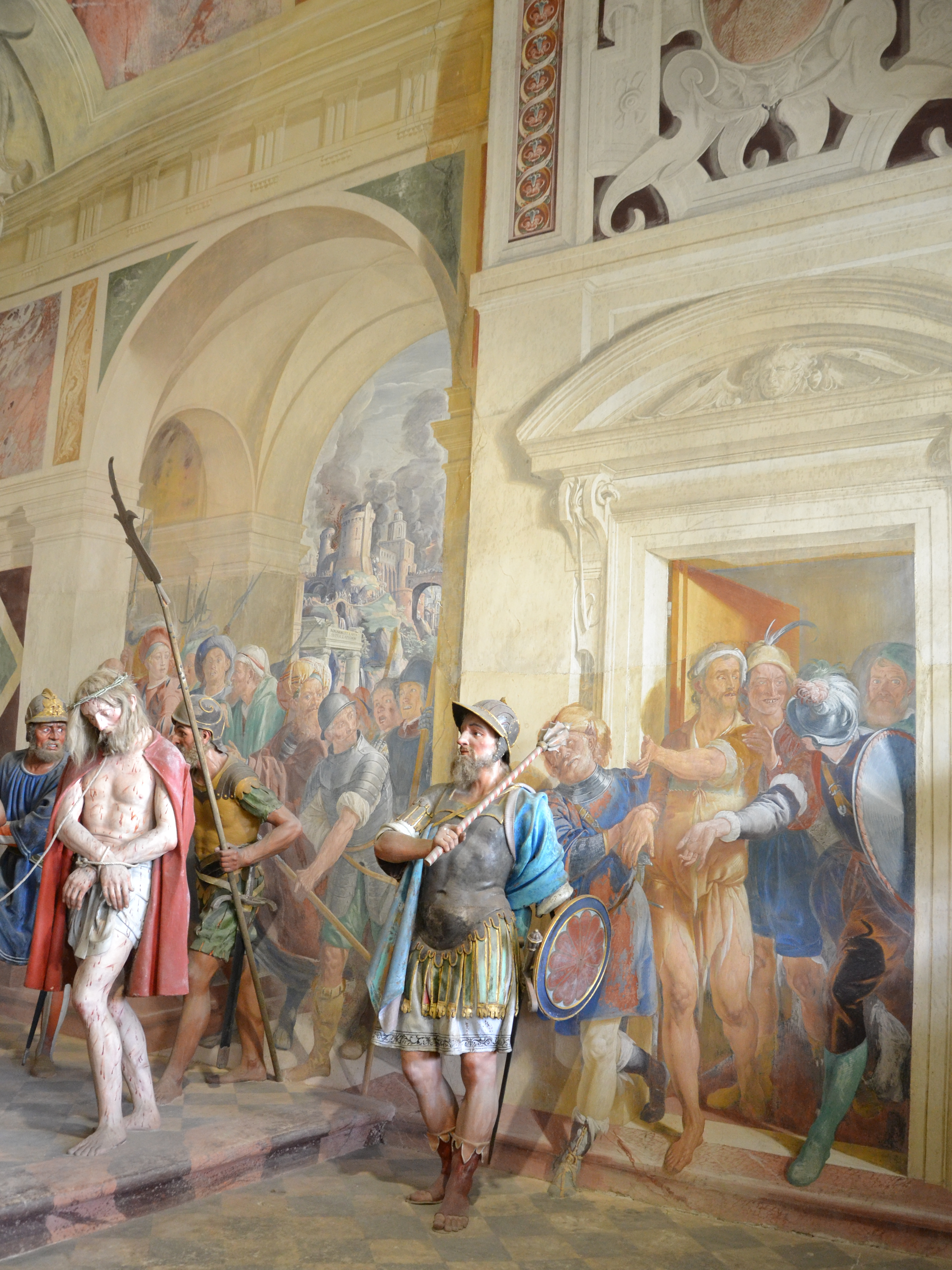 Sacro Monte (Varallo Sesia)